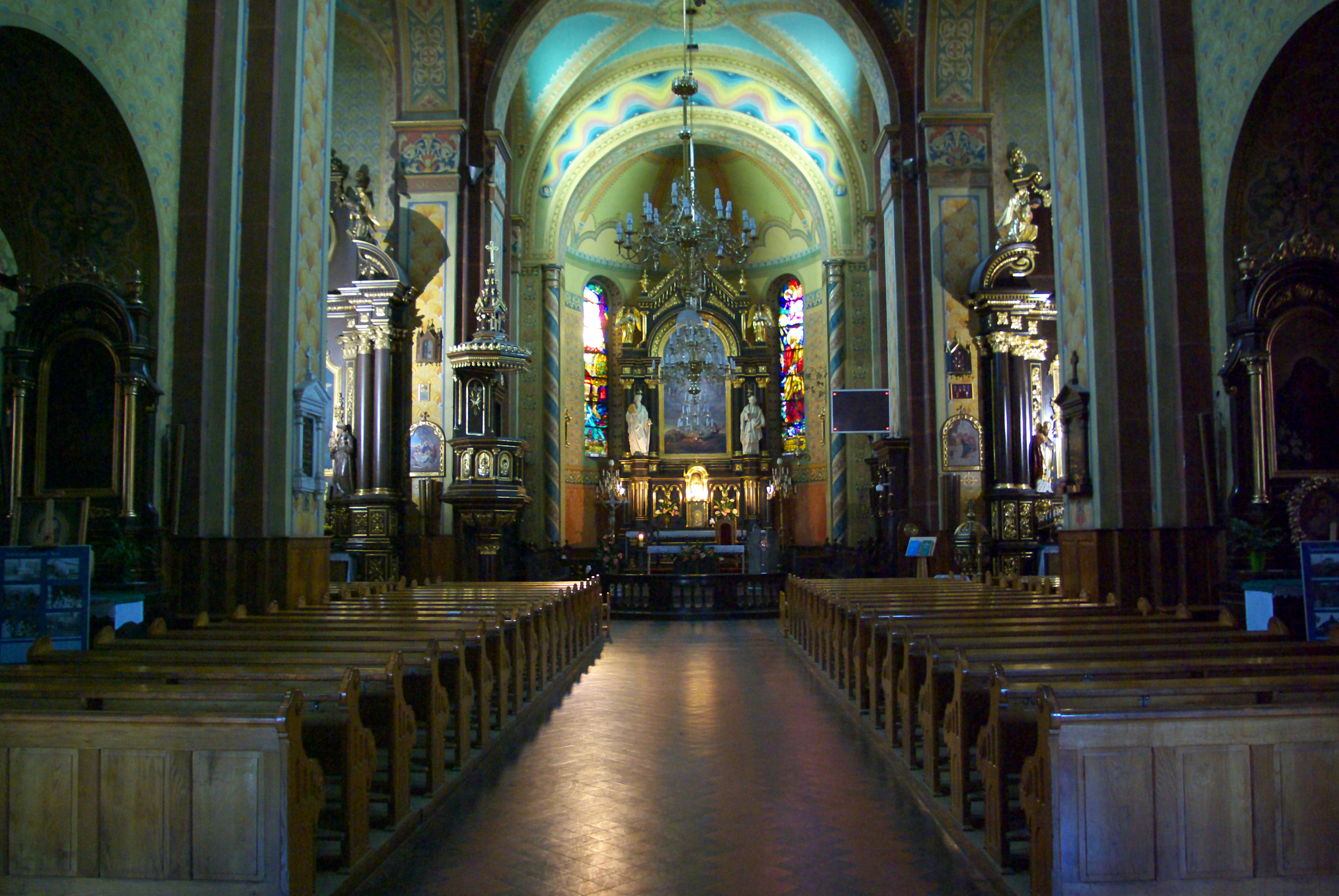 Wnętrze w kościele Przemienienia Pańskiego w Sanoku